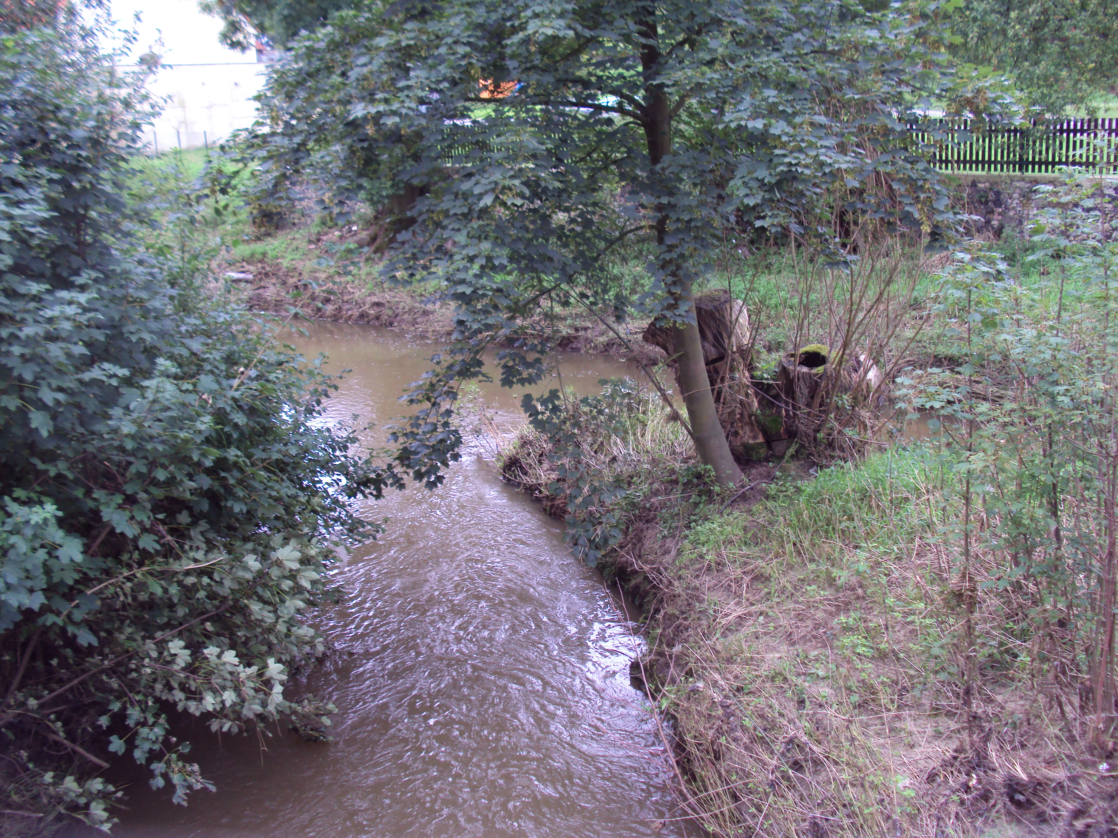 Soutok potoků Šporka a Libchava ve vsi Horní Libchava, hlavní je levá Šporka